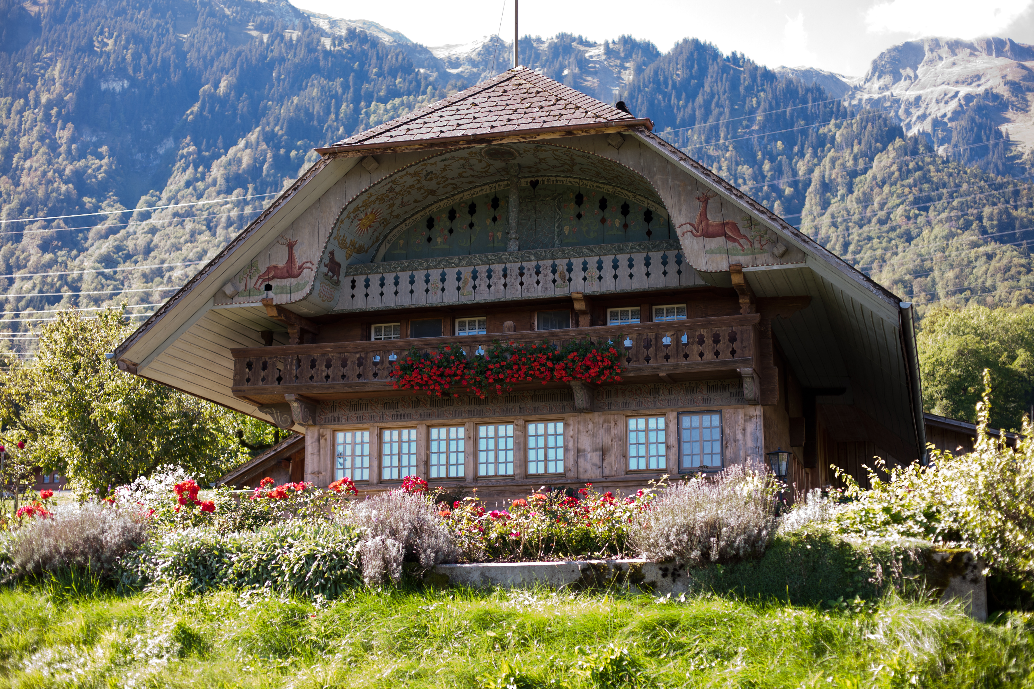 Lage 46.7242 7.53847